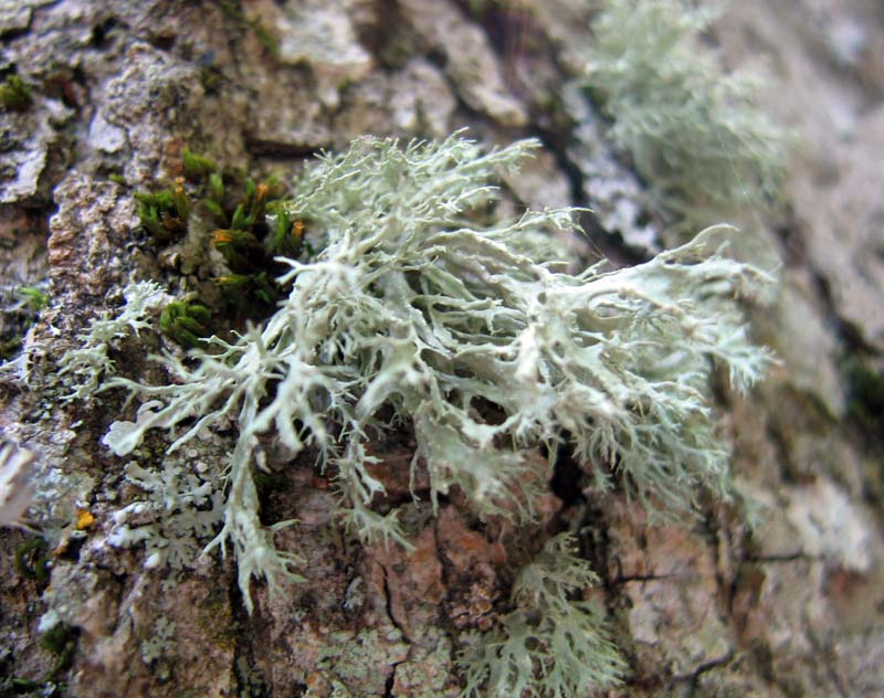 Lisaj sa Biogradske gore